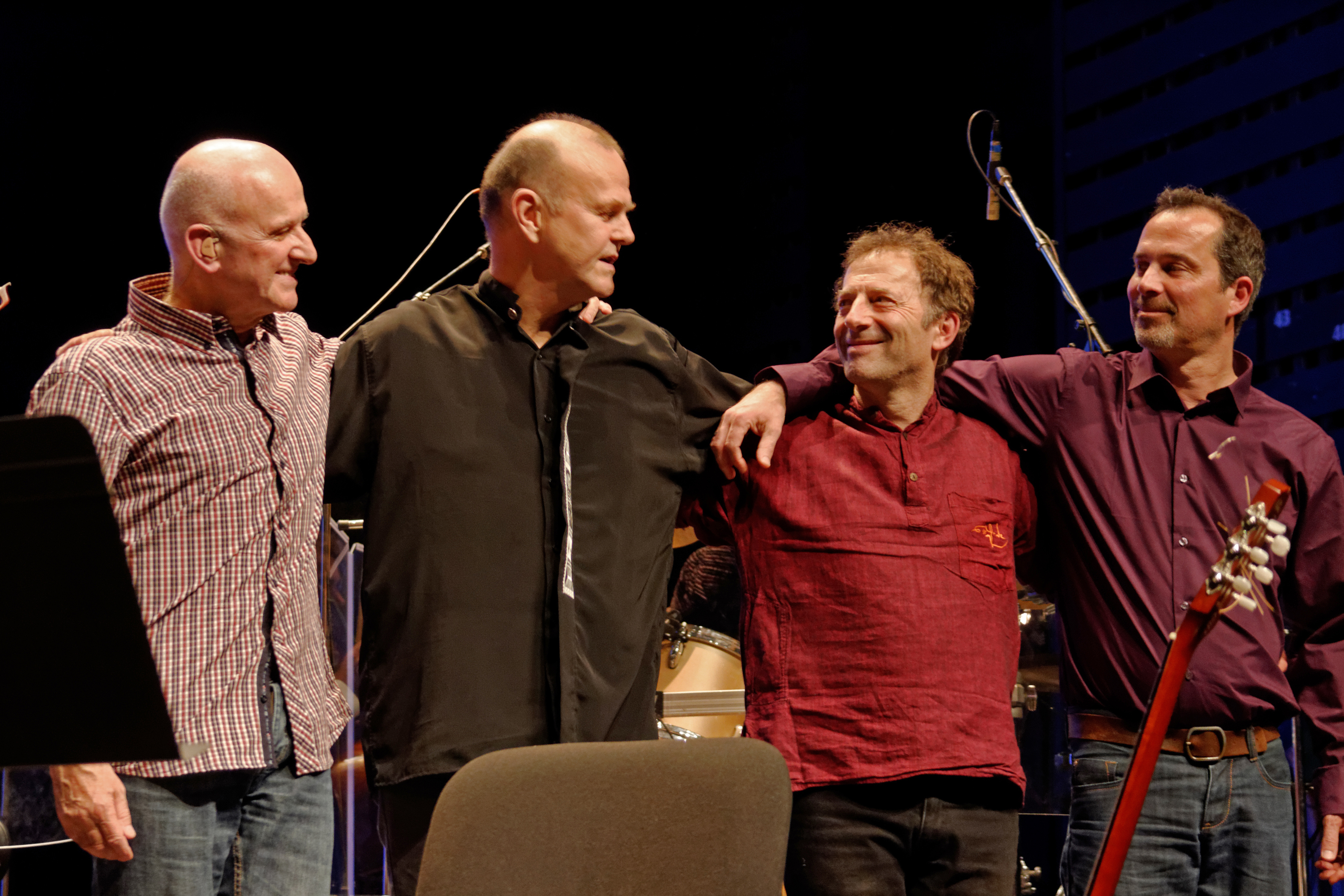 Projet Taliesin #1 de Dan Ar Braz et l'Orchestre symphonique de Bretagne au Théâtre National de Bretagne à Rennes le 18 décembre 2015. Premier concert interactif diffusé sur Internet et trois chaînes bretonnes.